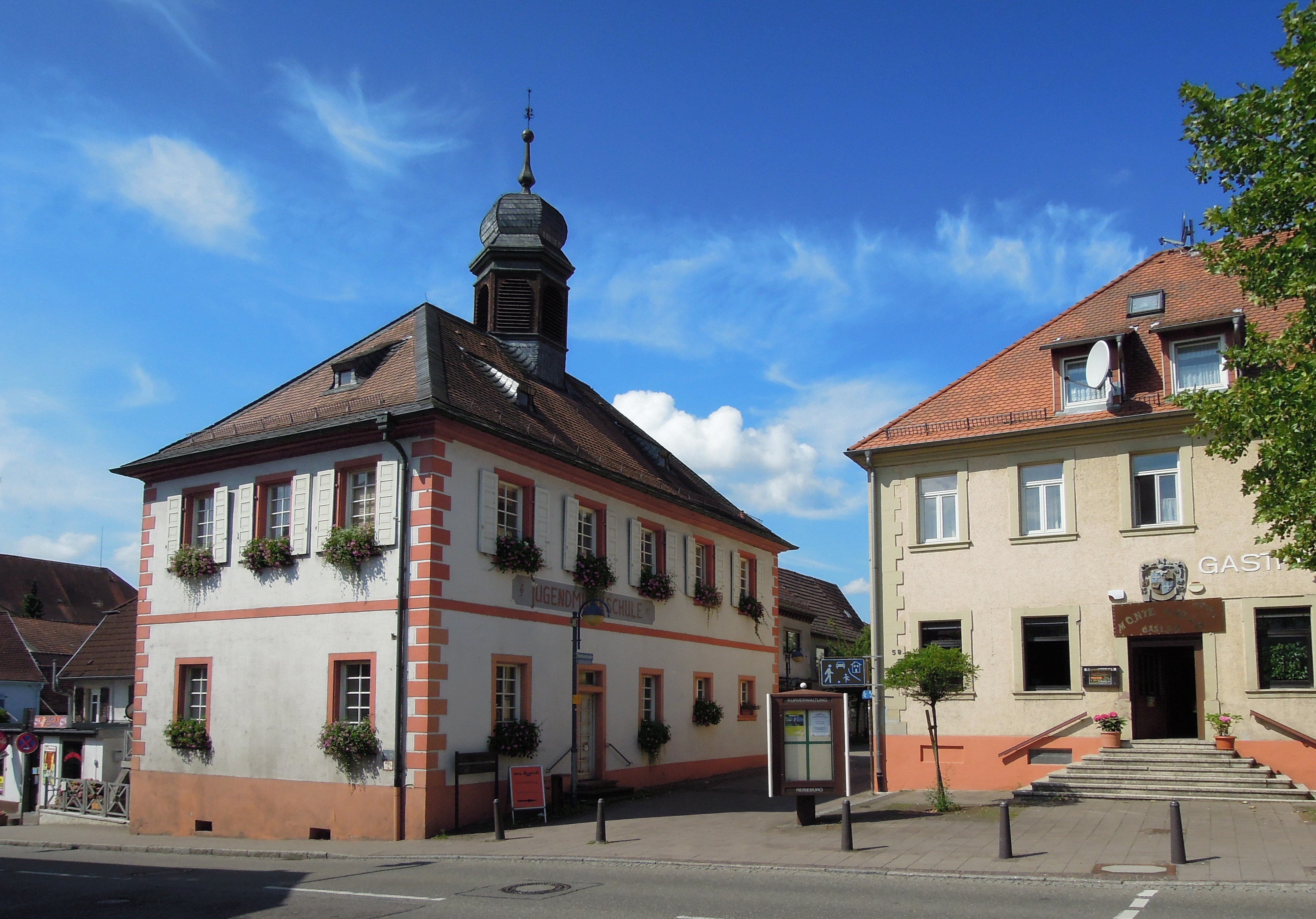 Dorfbrunnen in Bad Schönborn